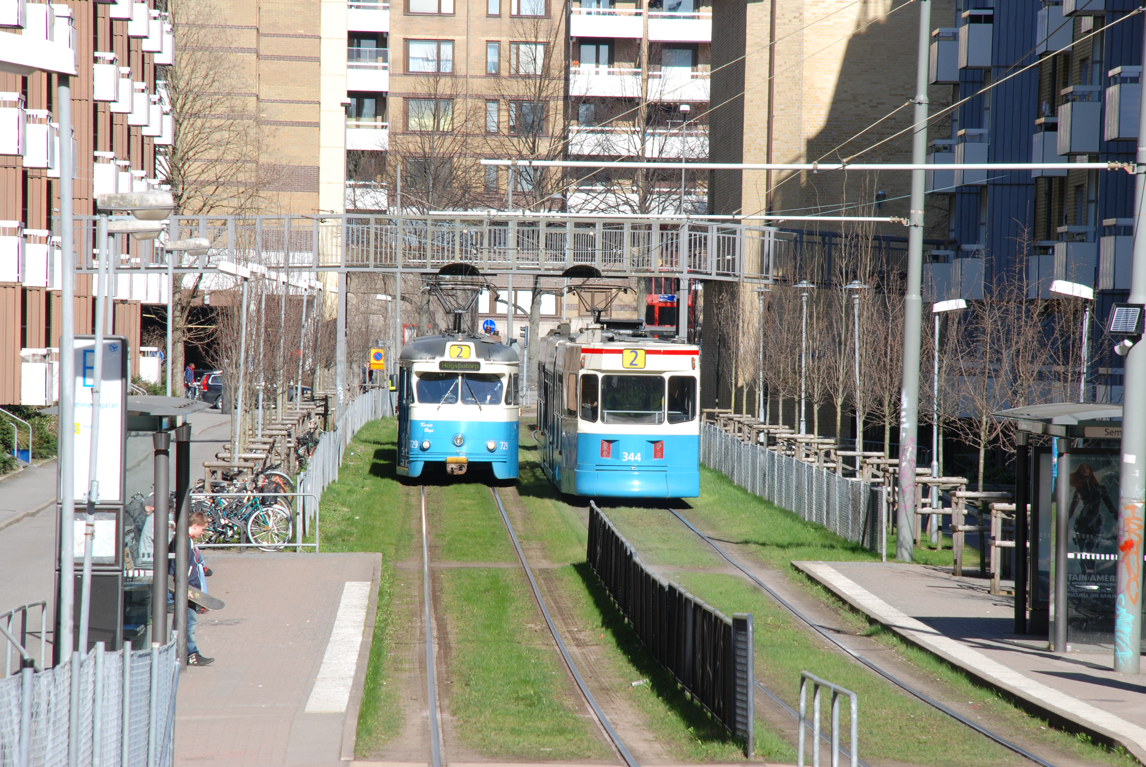 Västergatan i stadsdelen Annedal i Göteborg. Spårvagnshållplatsen Seminariegatan i riktning norrut.